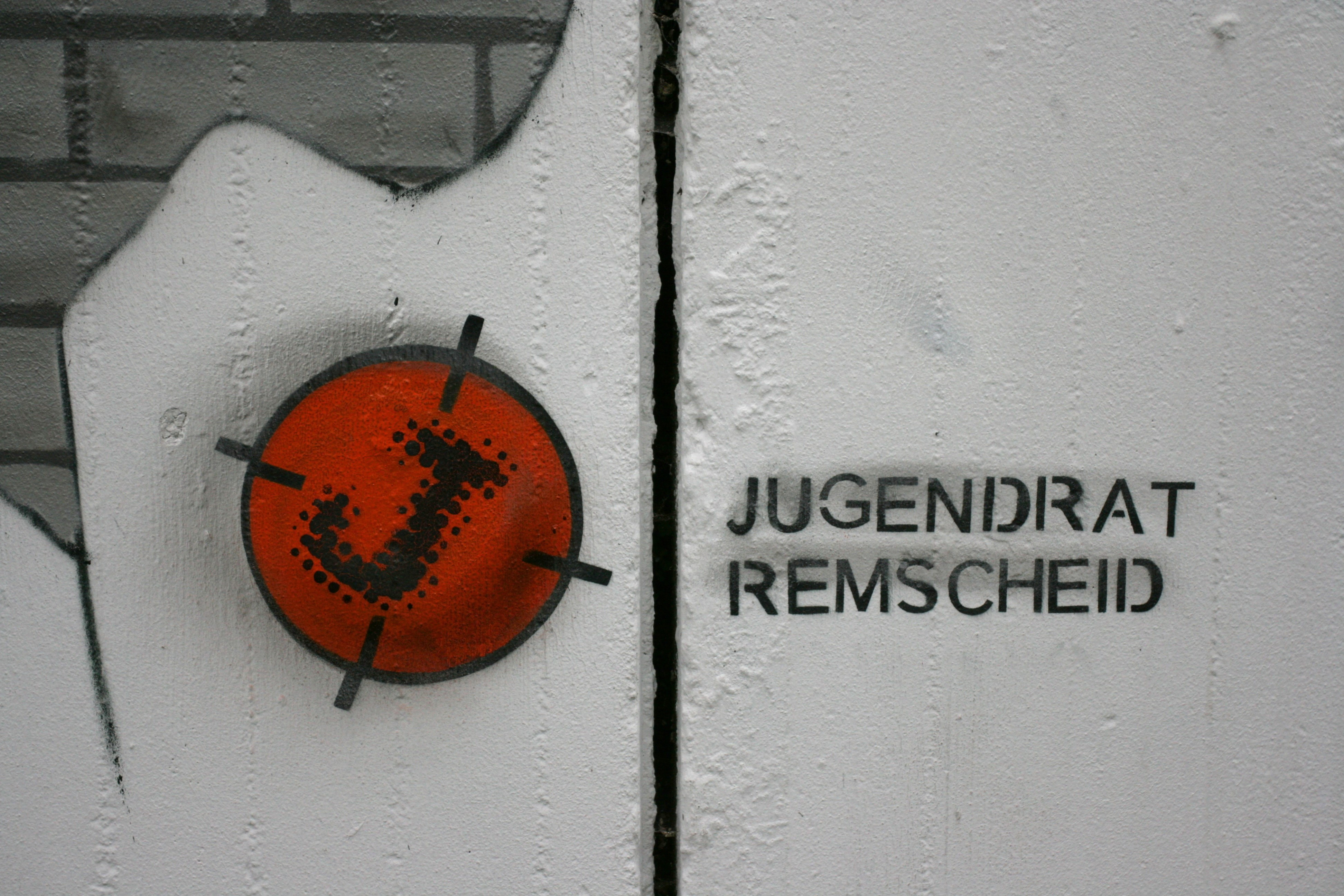 Wandbild (1 von 4) von René Schneider auf der an der Ludwigstraße gelegenen Mauer des Ernst-Moritz-Arndt-Gymnasiums in Remscheid